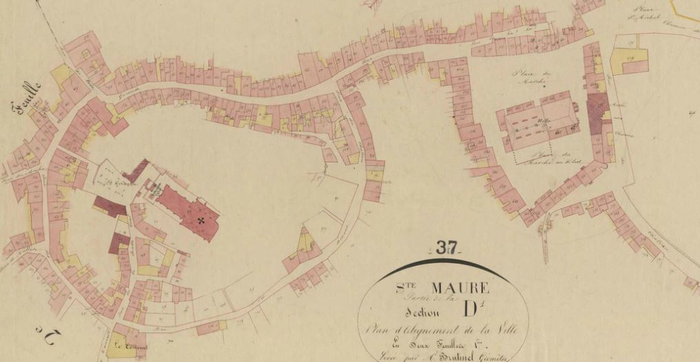 Plan de cadastre napoléonien de Sainte-Maure-de-Touraine en 1827, section D2, centre-bourg historique